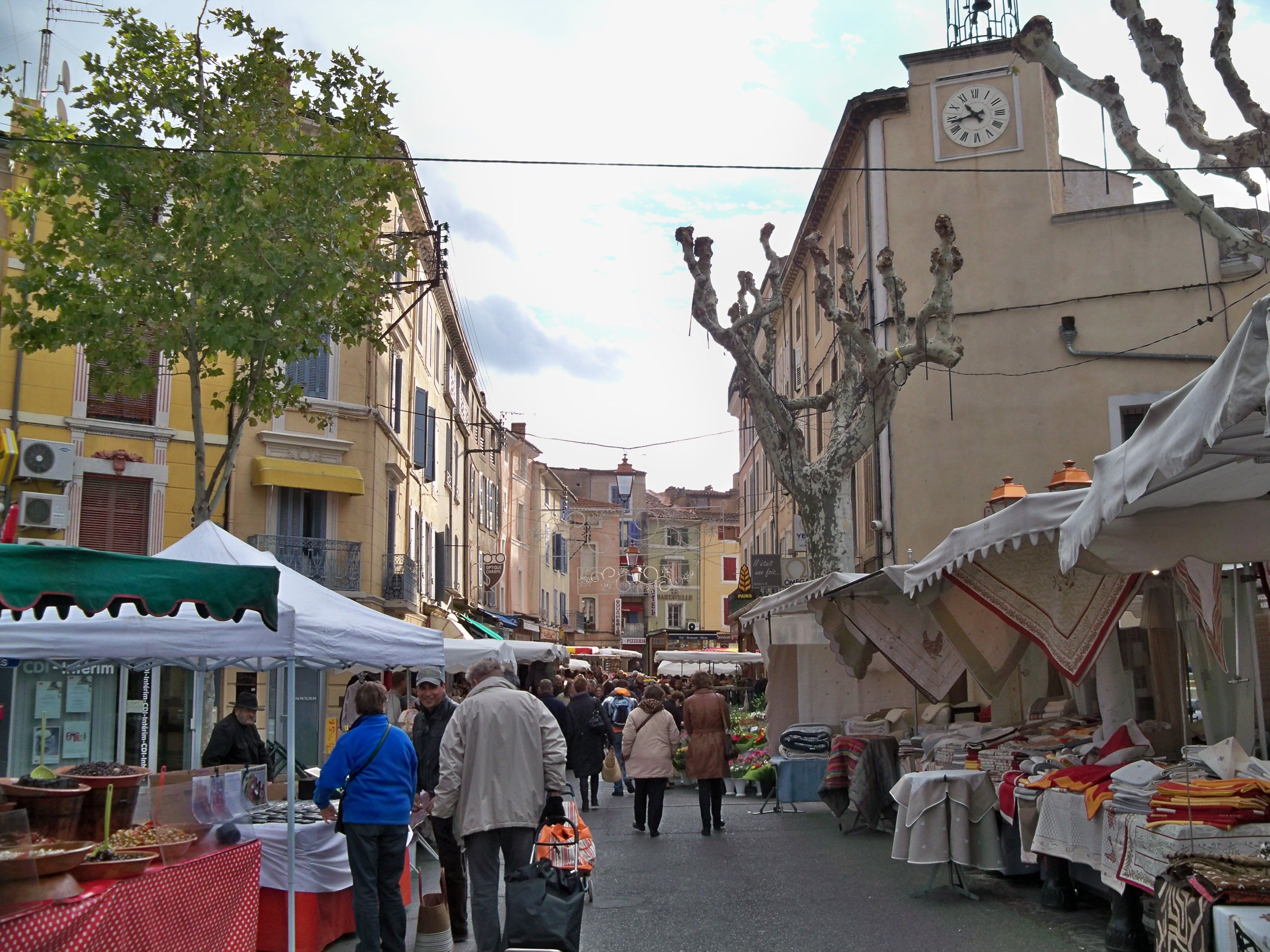 vue générale du marché d'Apt (Vaucluse, France)